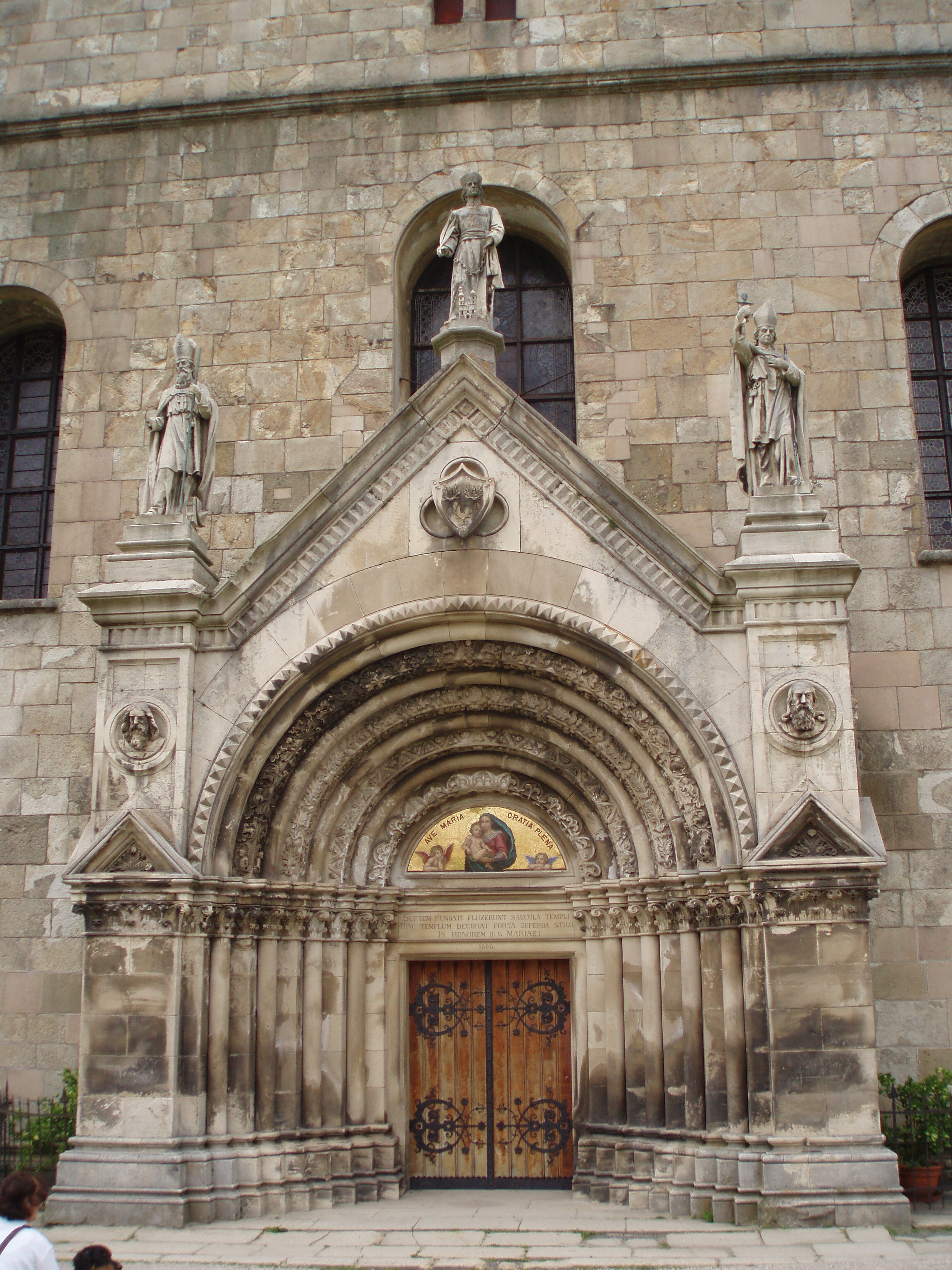 Premonstrátský klášter Teplá, Klášter 7, Klášter (Teplá).